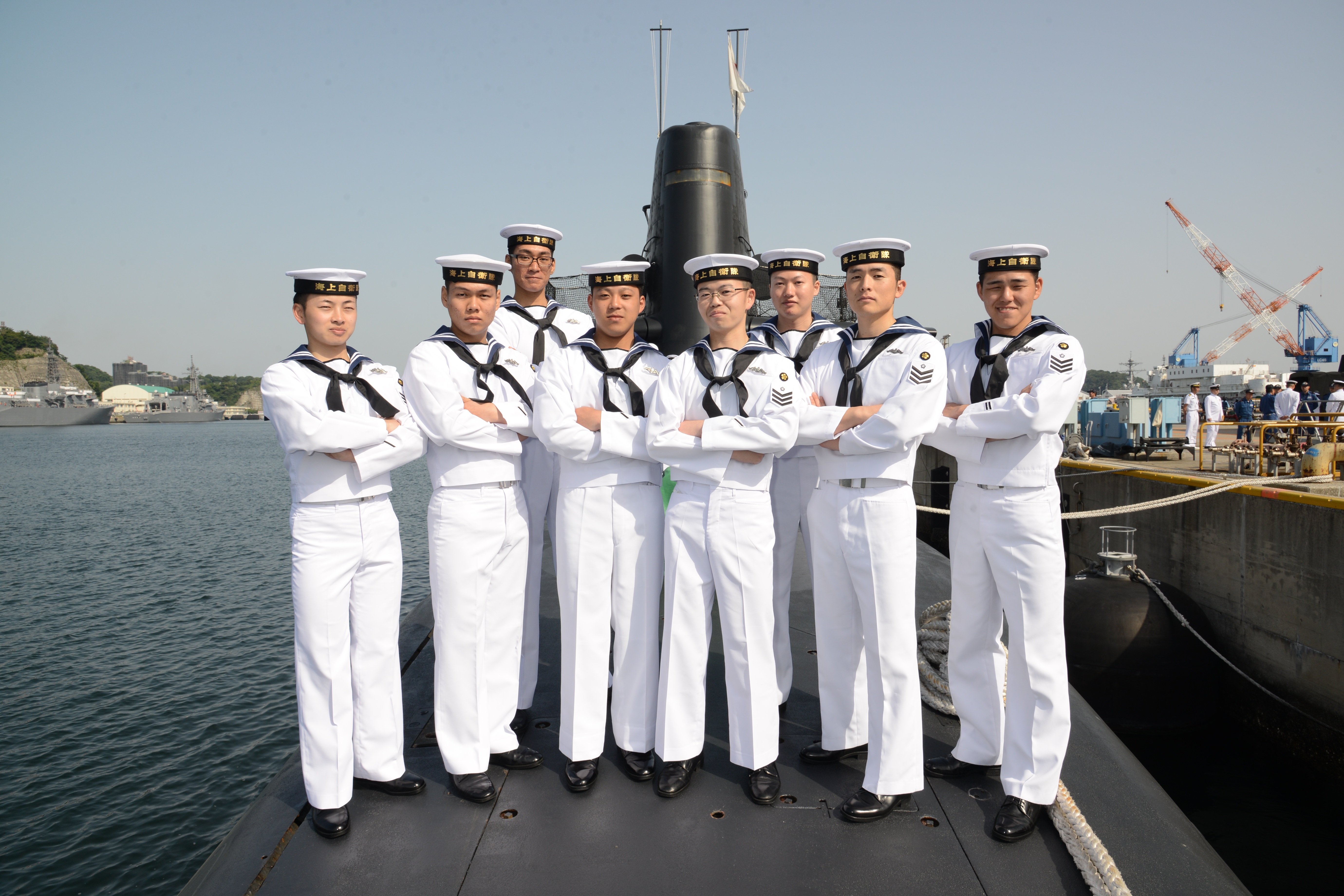 JMSDF Sailors Summer Dress Uniform